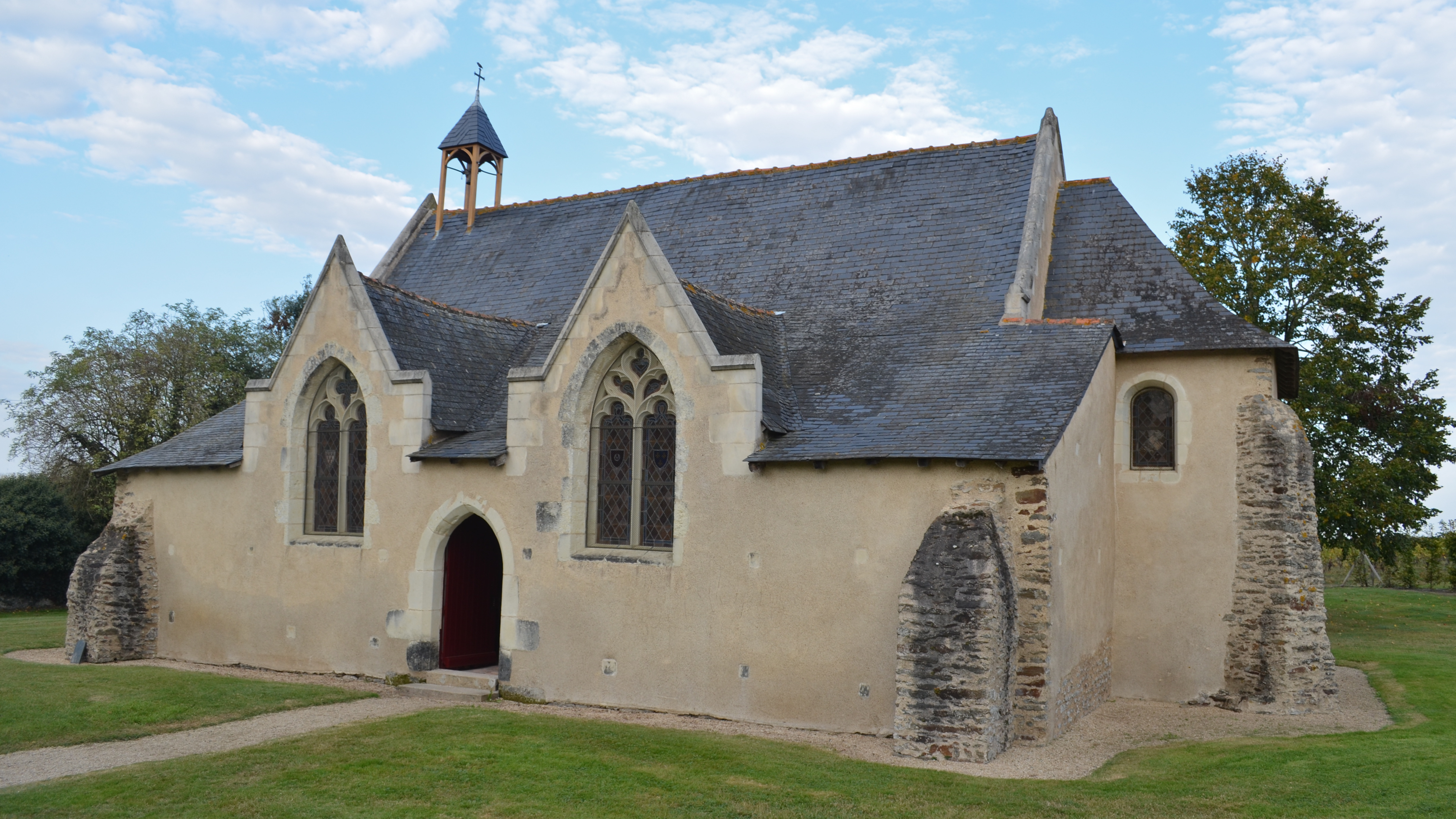 Chapelle Saint-Barthelémy - Saint-Julien-de-Concelles (Loire-Atlantique)